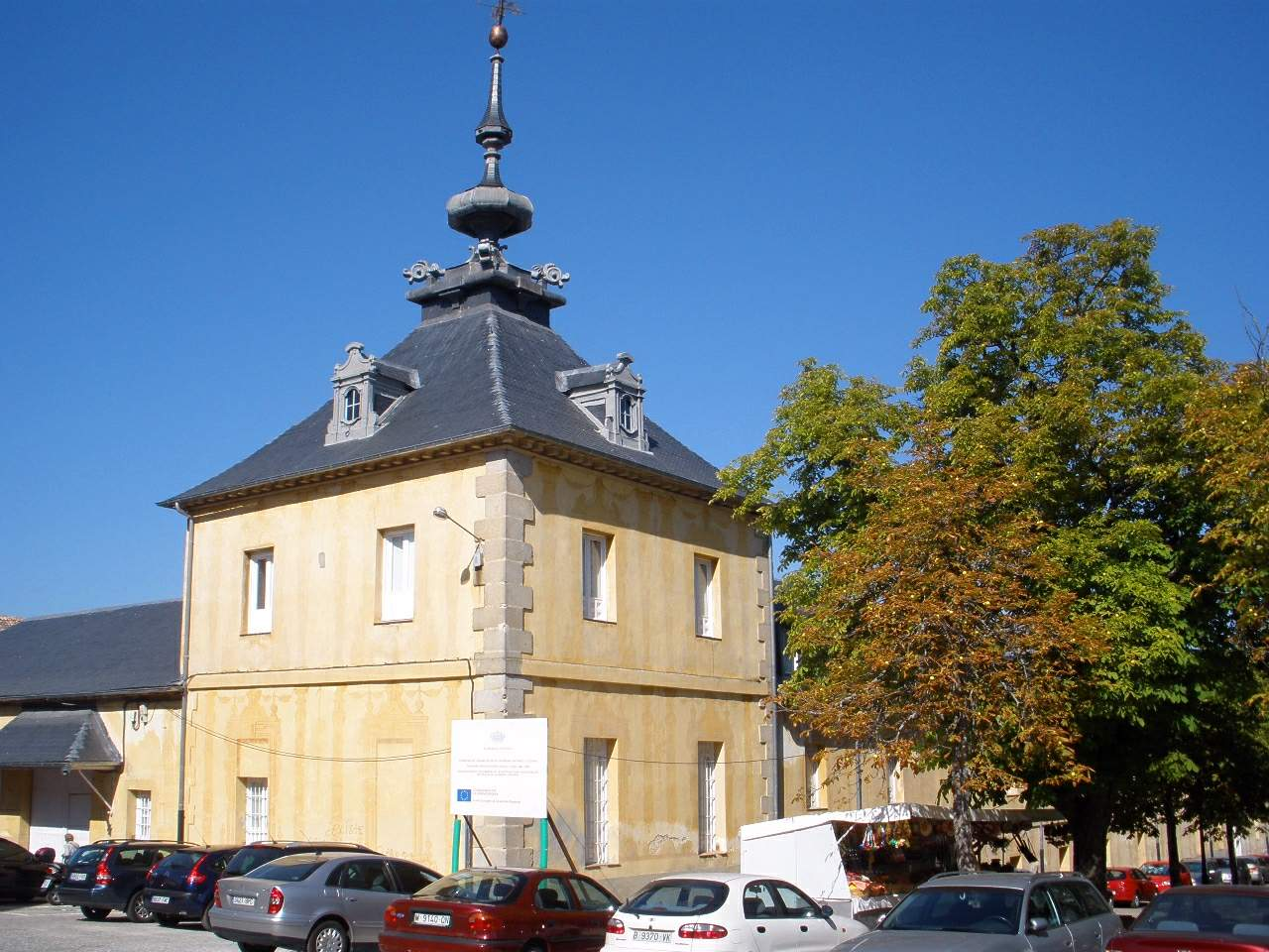 Antiguas Caballerizas Reales, Real Sitio de la Granja de San Ildefonso (Segovia)